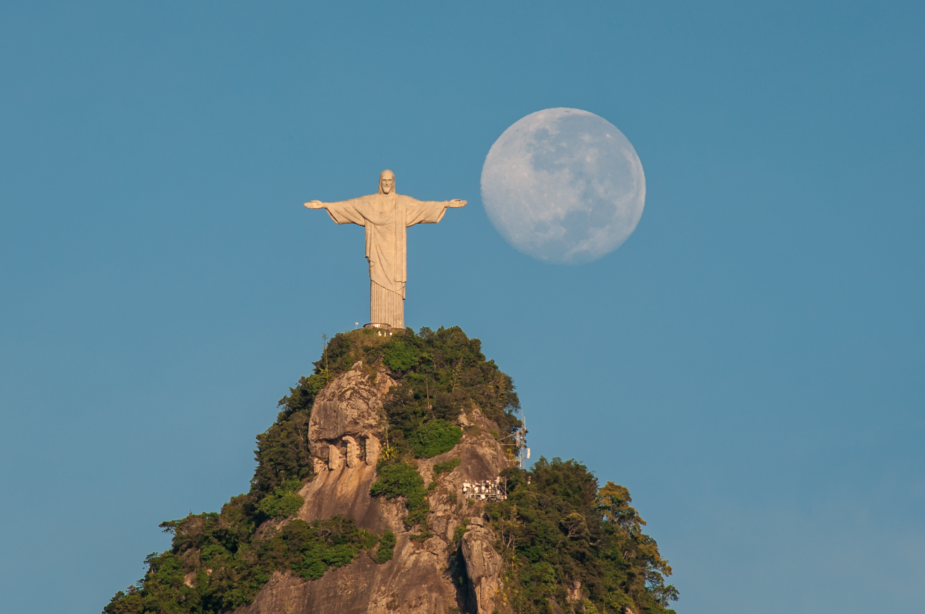 Cultural property Christ the Redeemer, Corcovado, Rio de Janeiro, Brazil Q79961, P727: BabelNet ID: 16378791n, IPHAN ID: 1478, Inventário dos Monumentos RJ ID: 1205